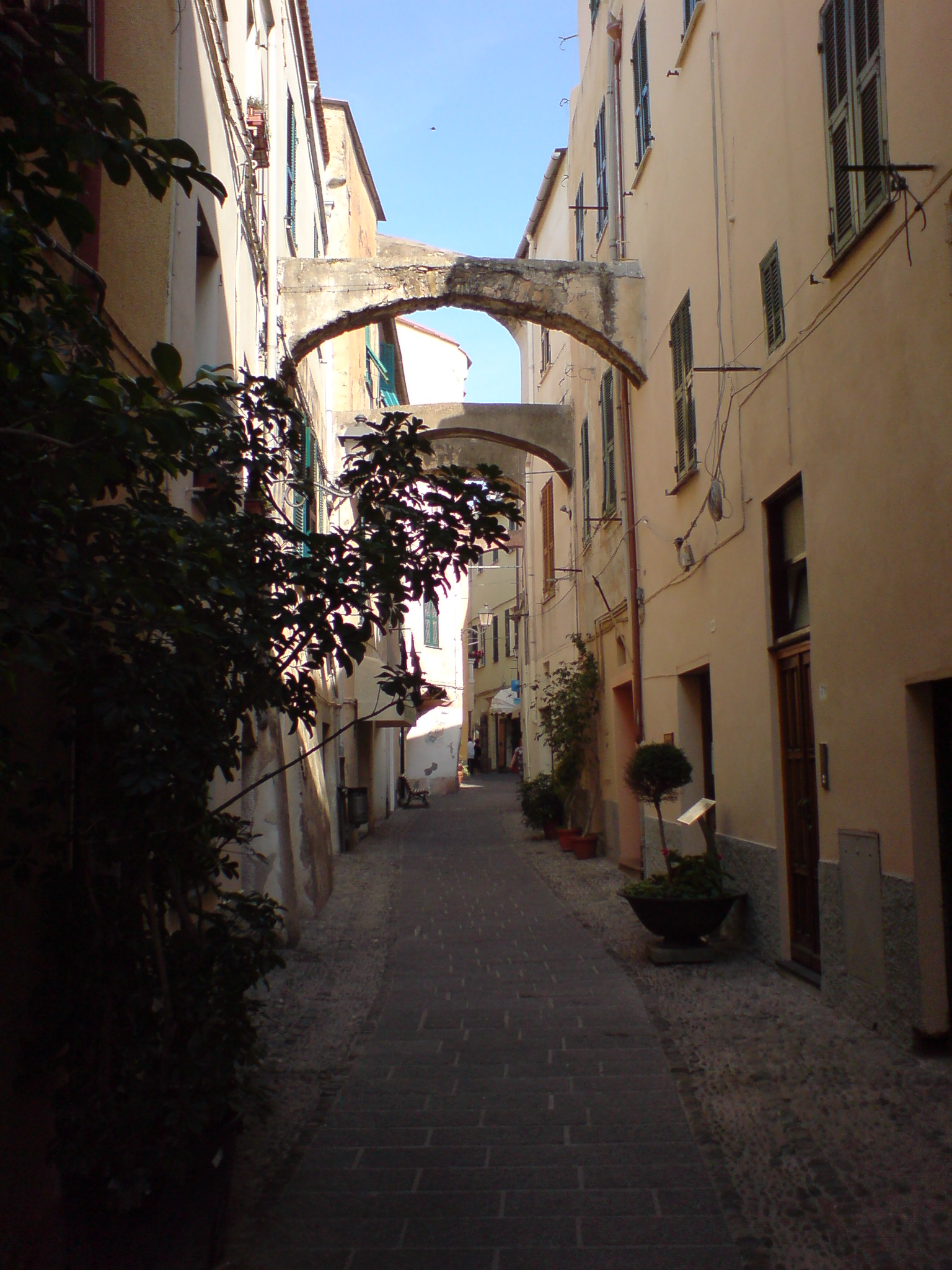 Santo Stefano al Mare (IM) - Caruggio principale